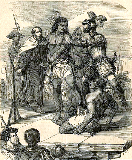 Caupolicán y Reinoso en manos de los españoles. La Araucana : poema / de D. Alonso de Ercilla y Zúñiga. Ed. ilustrada. Madrid : Impr. y Libr. de J. Gaspar Editor, 1884. 168 p.